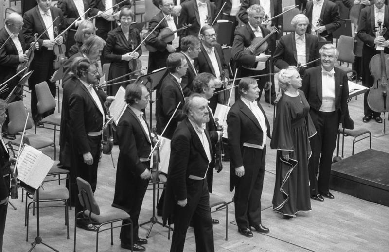 Leipzig, Gewandhausorchester ADN-ZB/Grubitzsch/8.2.83/Leipzig: Die Richard-Wagner-Tage der DDR wurden am 7.2. mit einem festlichen Konzert im Neuen Gewandhaus Leipzig eröffnet. Das Gewandhausorchester und der Gewandhauschor unter Leitung von Prof. Kurt Masur (4. v. r.) sowie die Solisten Eva-Maria Bundschuh (Sopran/2. v. r.), Theo Adam (Baß/rechts) und Klaus König (Tenor/3. v. r.) boten u.a. konzertante Auszüge aus den Opern "Der fliegende Holländer" und "Die Meistersinger von Nürnberg". Abgebildete Personen: Masur, Kurt Prof.: Dirigent, Gewandhauskapellmeister, Philharmonie Dresden, DDR Klaus König: Opernsänger, Tenor, DDR Bundschuh, Eva-Maria: Opernsängerin, Sopran, Hans-Otto-Theater Potsdam, DDR Adam, Theo Prof.: Opernsänger, Bassbariton, DDR